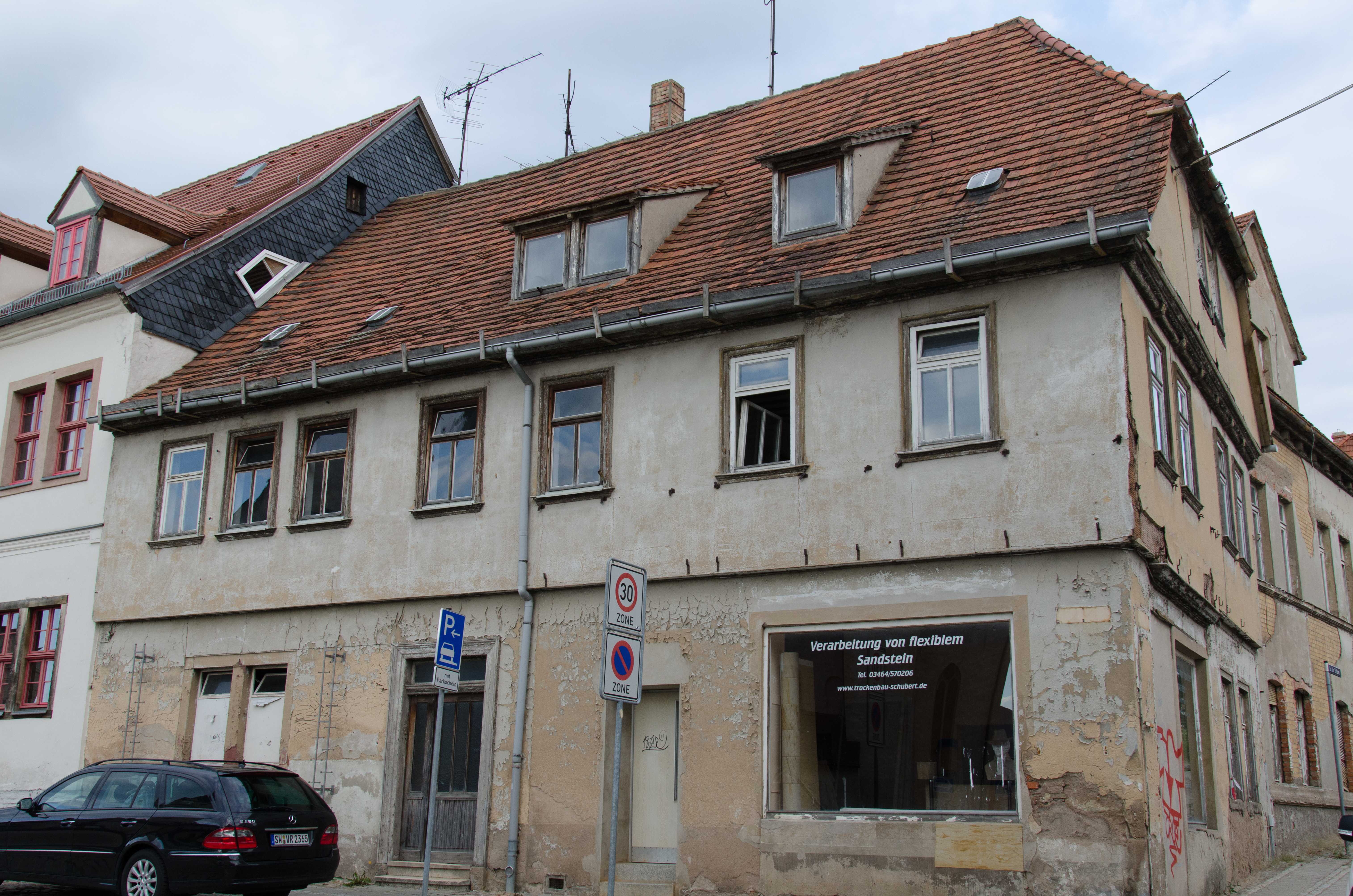 Sangerhausen, Ulrichstraße 22